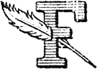 Logo du Figaro (version de 1920)